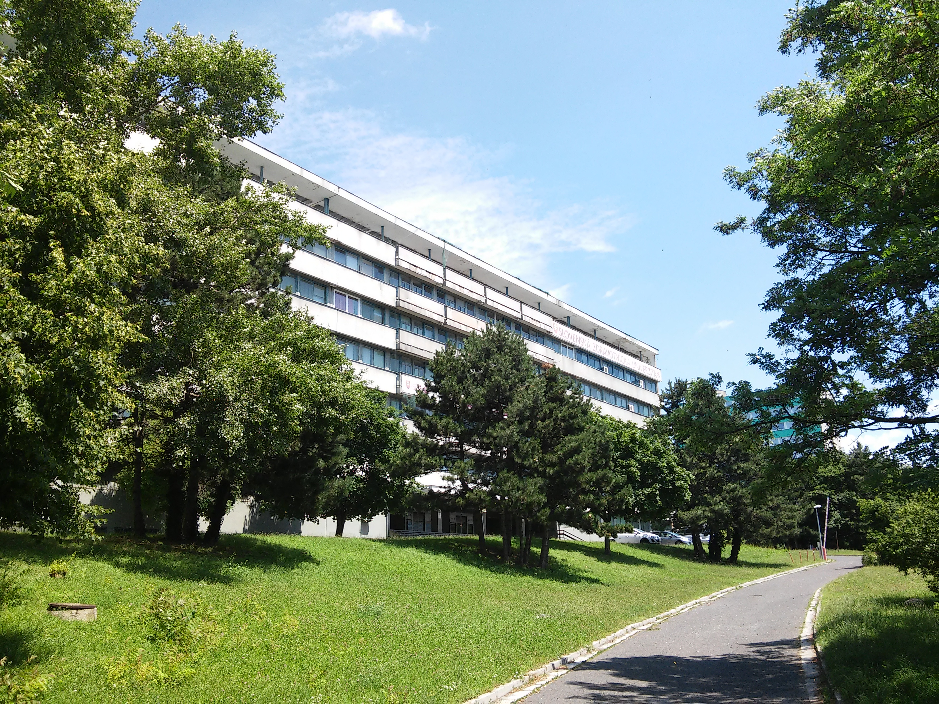 Slovenská zdravotnícka univerzita, Limbová 12, Nové Mesto, Bratislava